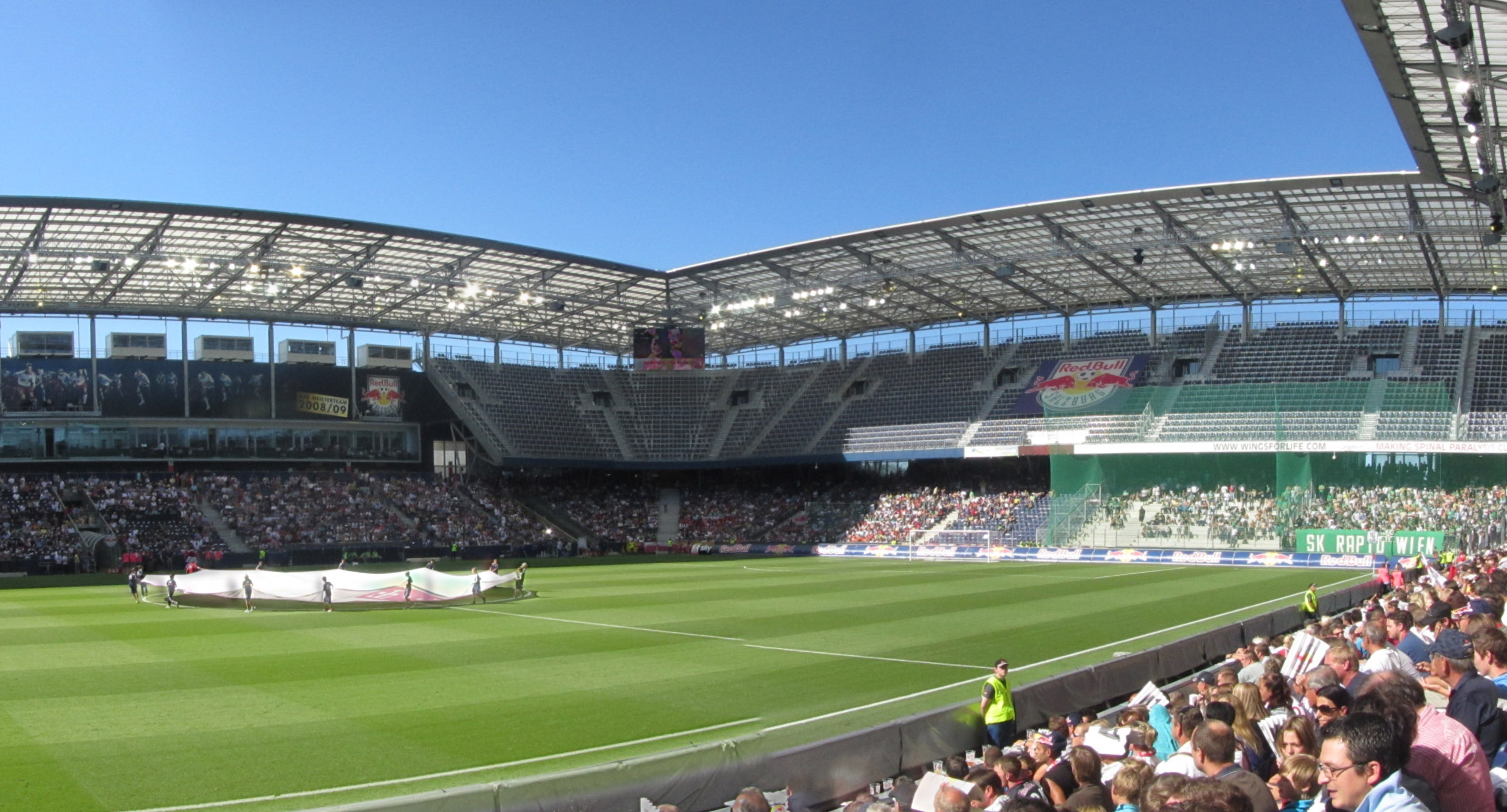 28-Aug-2011, Red Bull Salzburg - Rapid Wien, Panorama